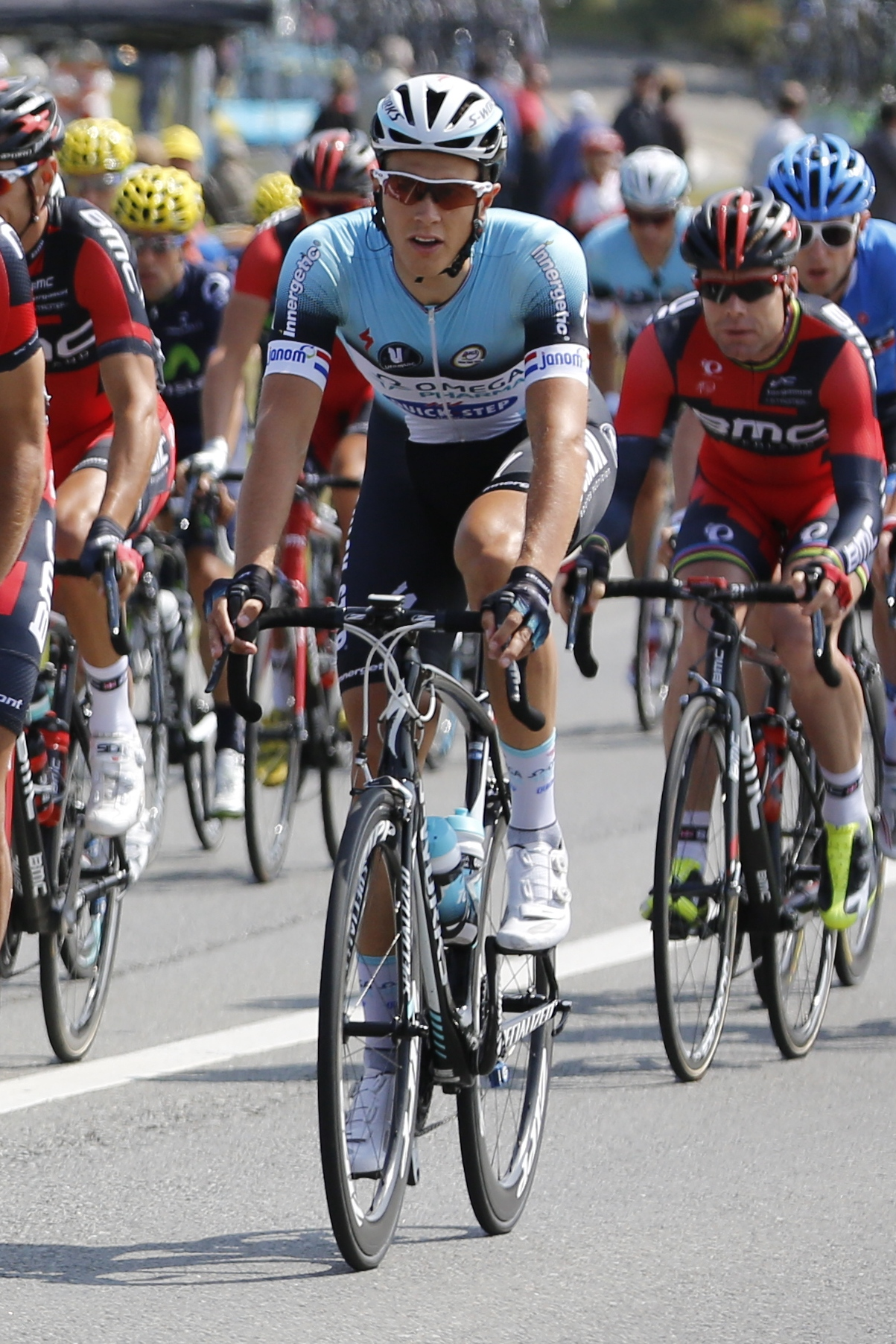 Niki Terpstra au départ de la 12e étape du Tour de France 2013 sur la Route nationale 12 à Javené.